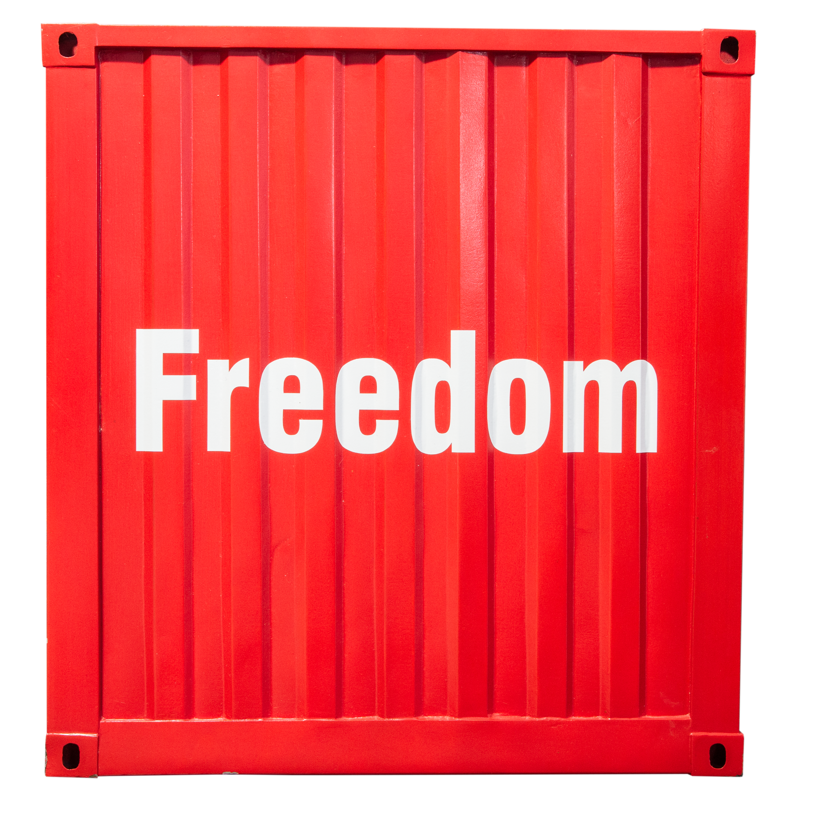 Rückseite Container Meta Values